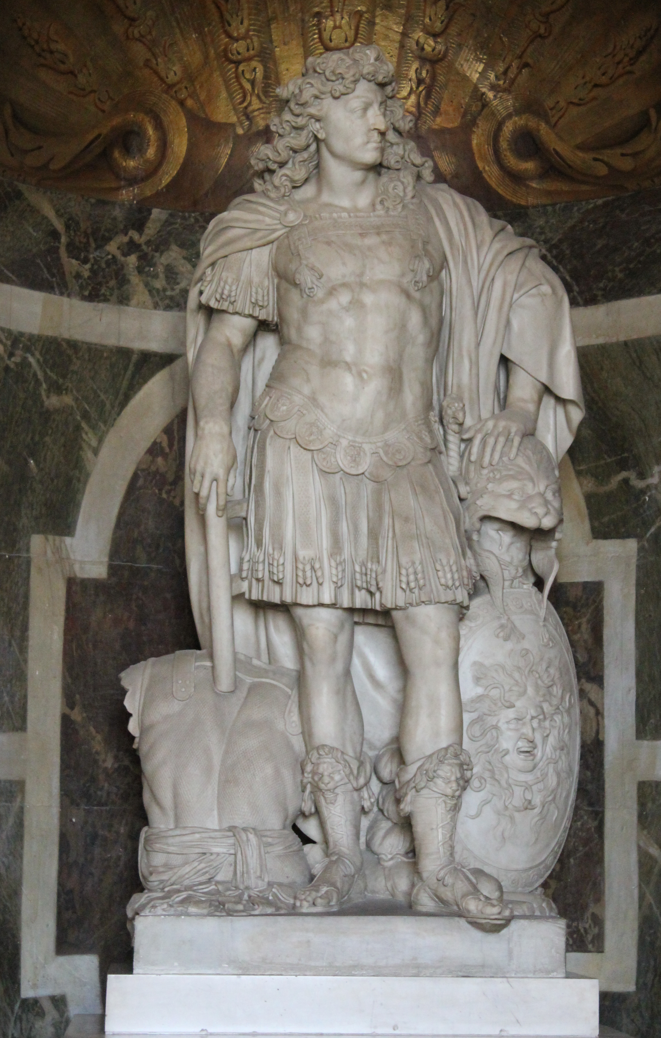 Château de Versailles, salon de Vénus, Louis XIV en empereur romain, par Jean Varin.